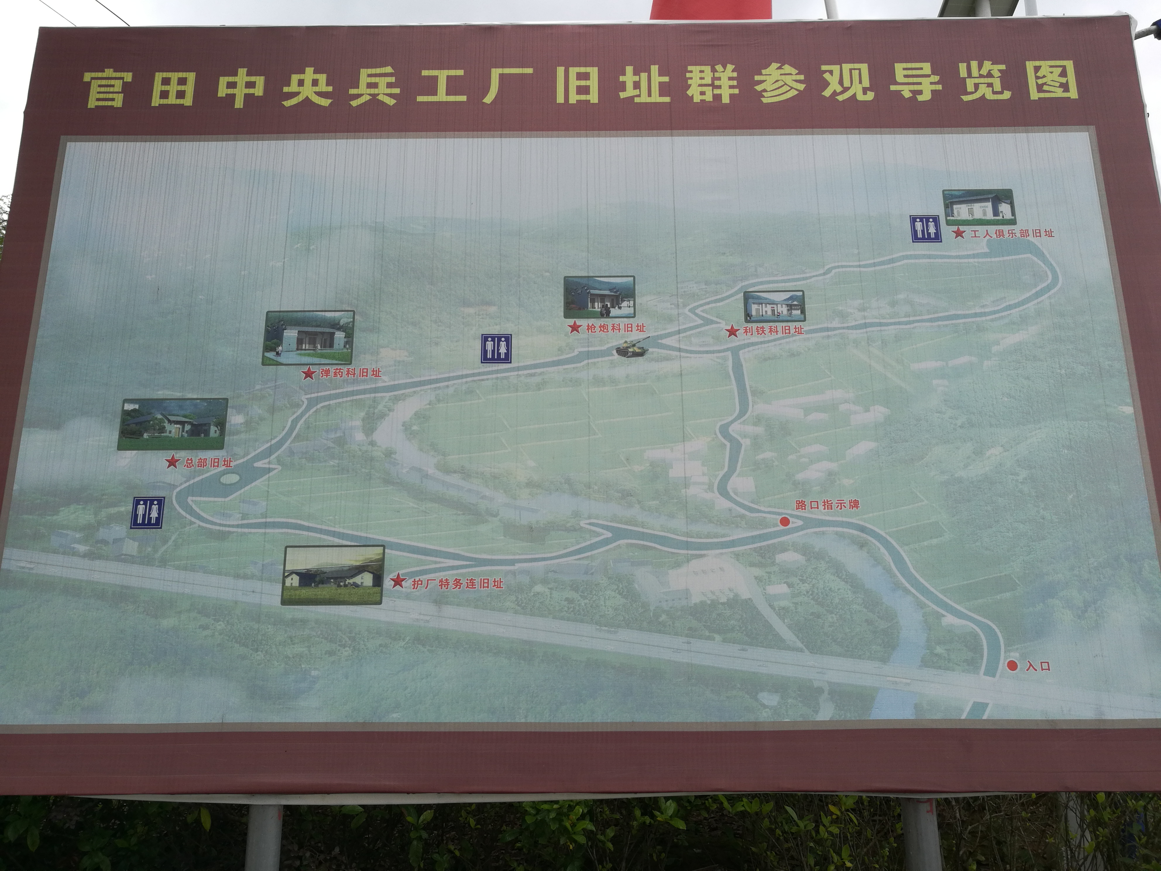 中央兵工厂旧址群—参观导览图